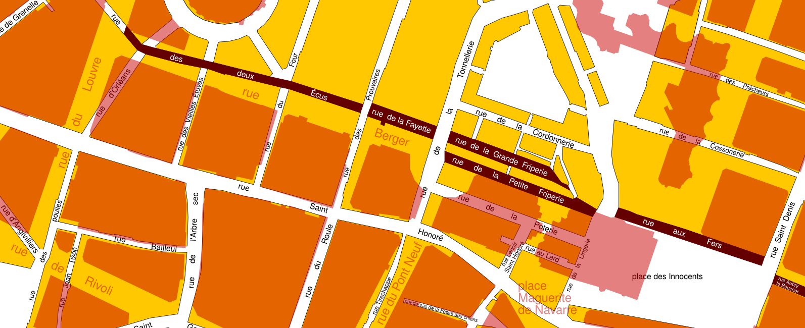 Les anciennes rues en 1793-1795 qui formèront la rue Berger à Paris (plan des sections, feuille 34) avec, en superposition, le tracé contemporain (2014) des rues